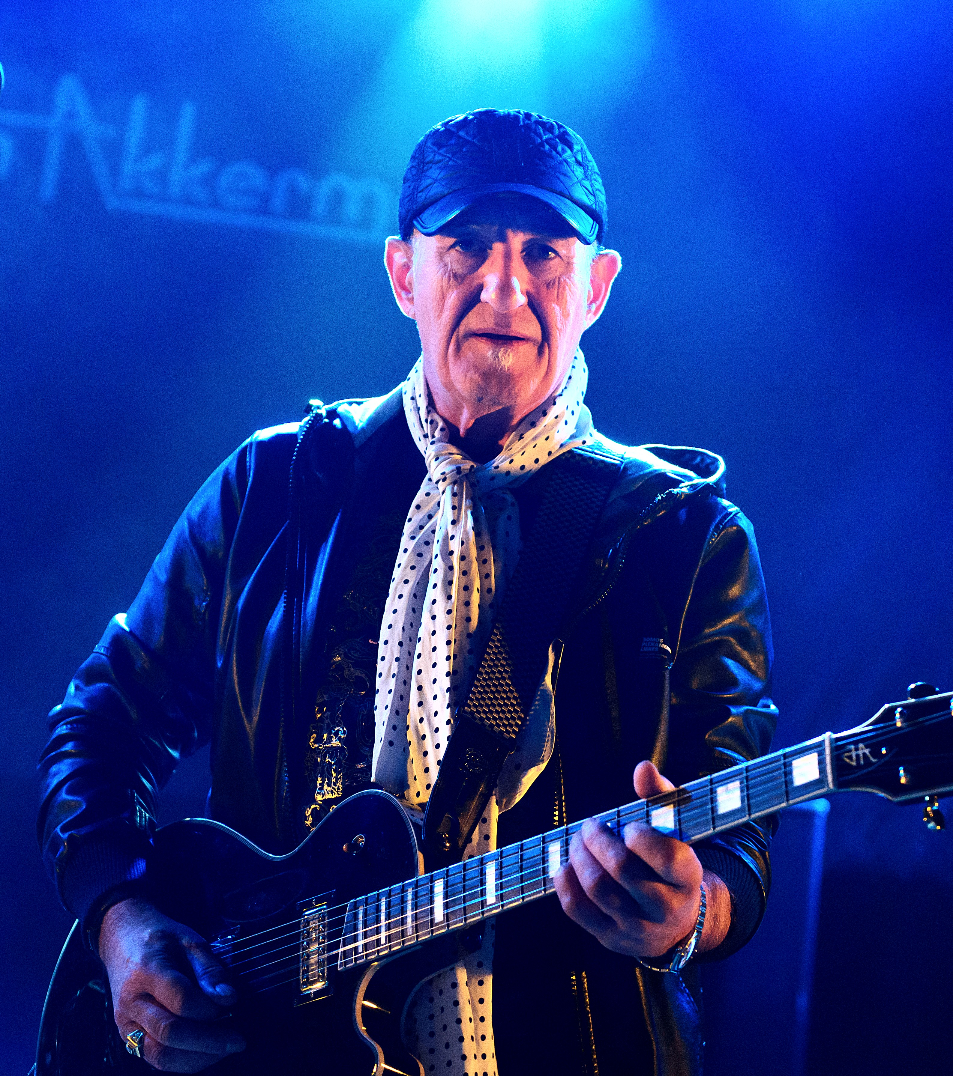 Jan Akkerman live im Knust Hamburg 2017